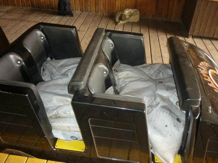 Lest sur l'anaconda Walygator Parc